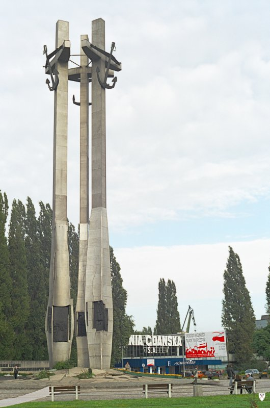 Pomnik Poległych Stoczniowców w Gdańsku